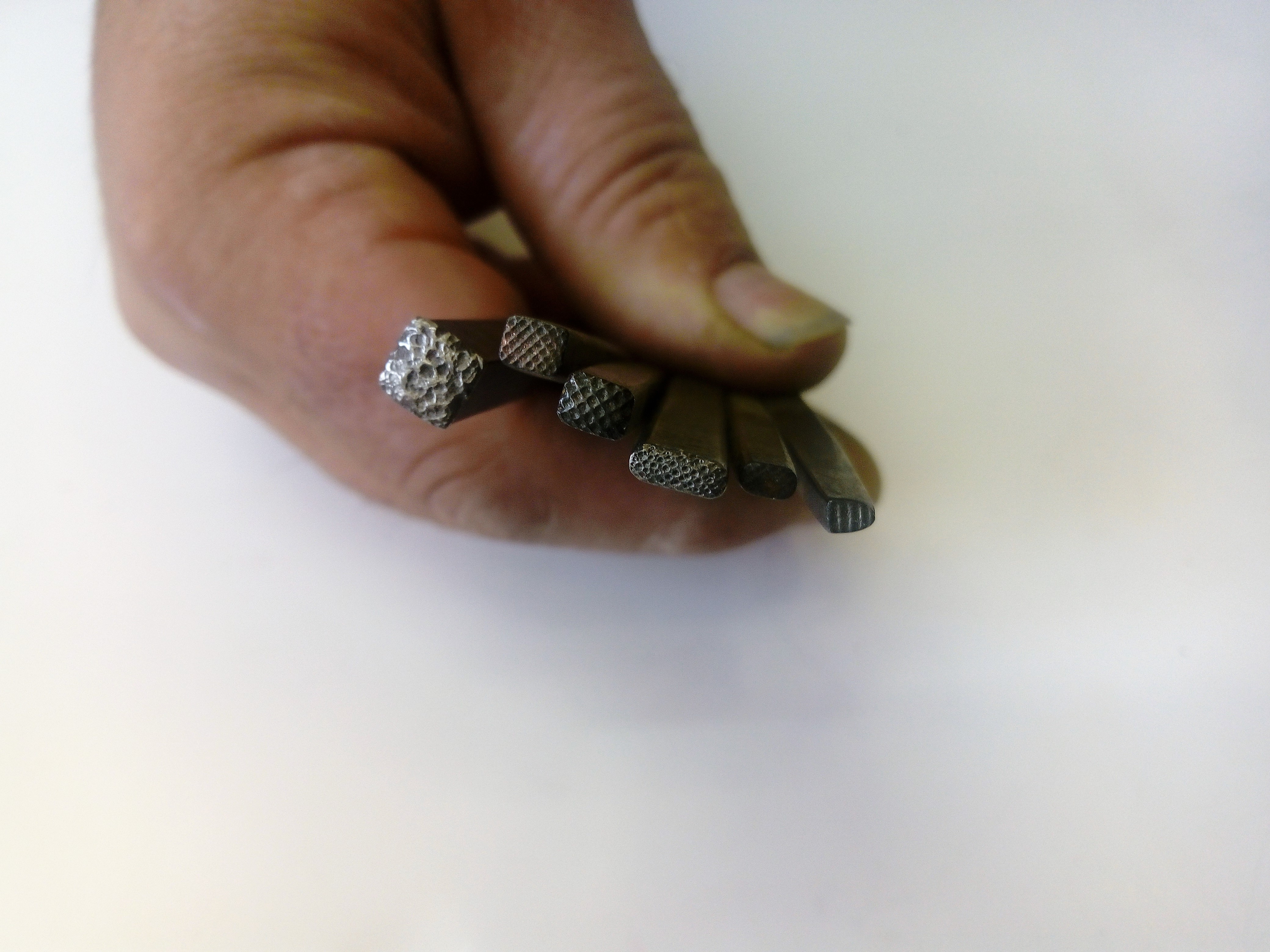 Têtes de ciselets mats, c'est à dire non lisses